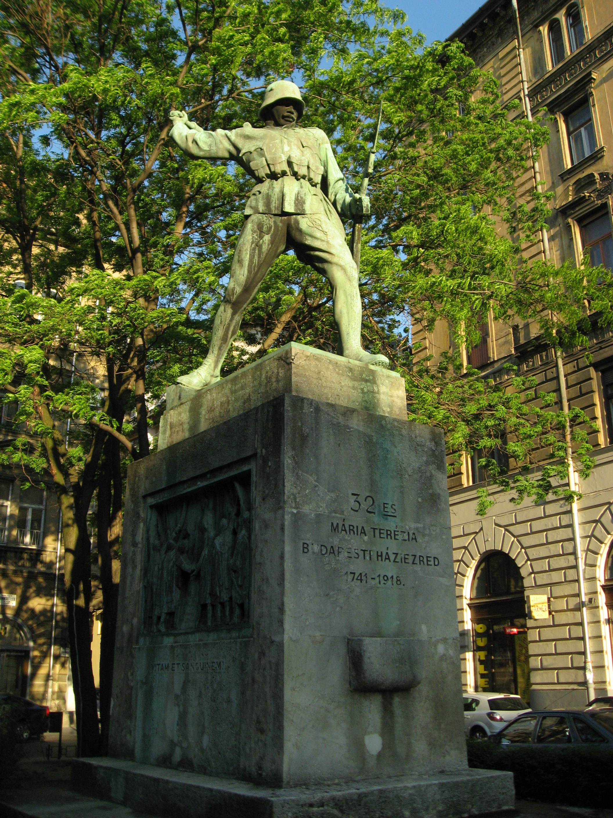 Budapešť